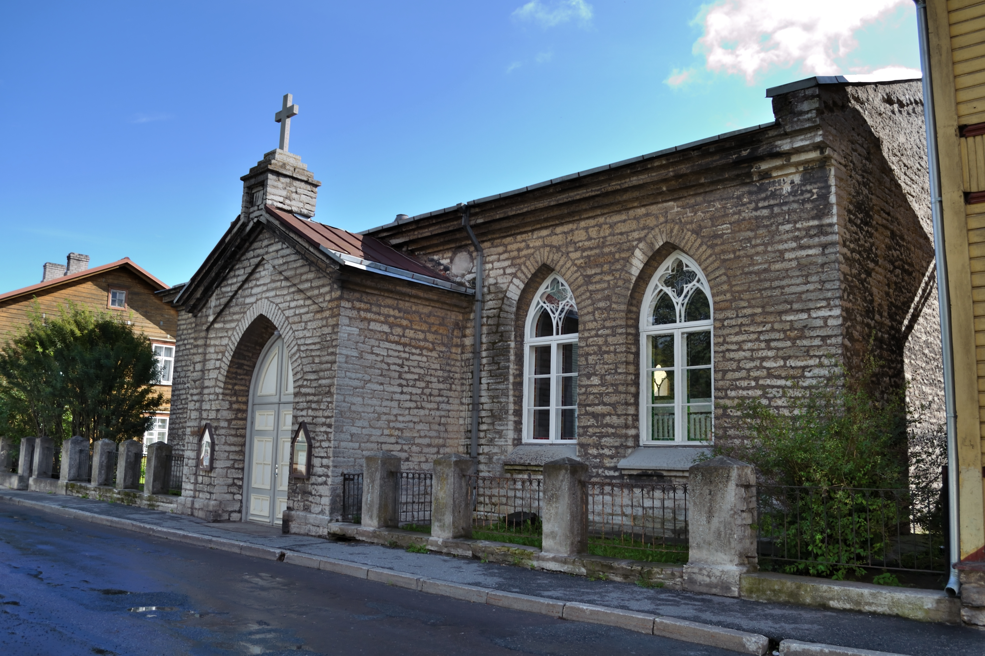 Tallinn, baptistide Kalju-koguduse palvela